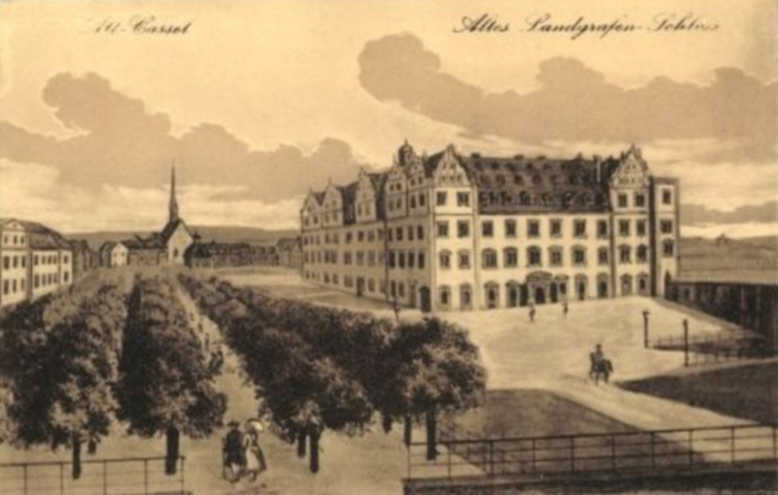 Das alte Landgrafenschloss in Kassel auf eine Postkarten-Lithografie von um 1900, ohne Firmenkennung. Nach einem Gemälde von um 1800. Das Bild war aus dem Bereich der Bastion gemalt; links im Hintergrund das alte Barfüßer-Kloster mit Kirche.